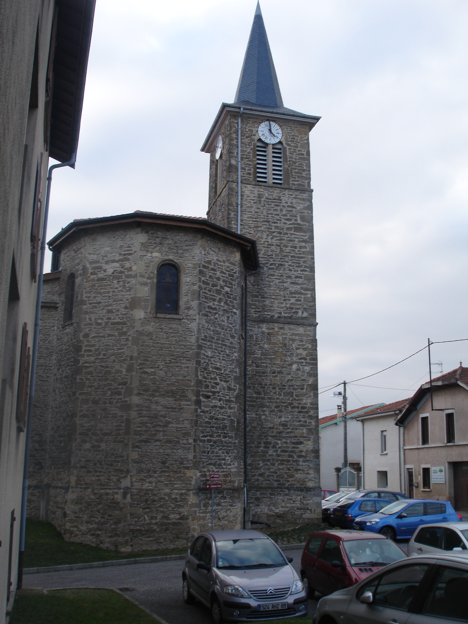 Valencin (38) : L'église